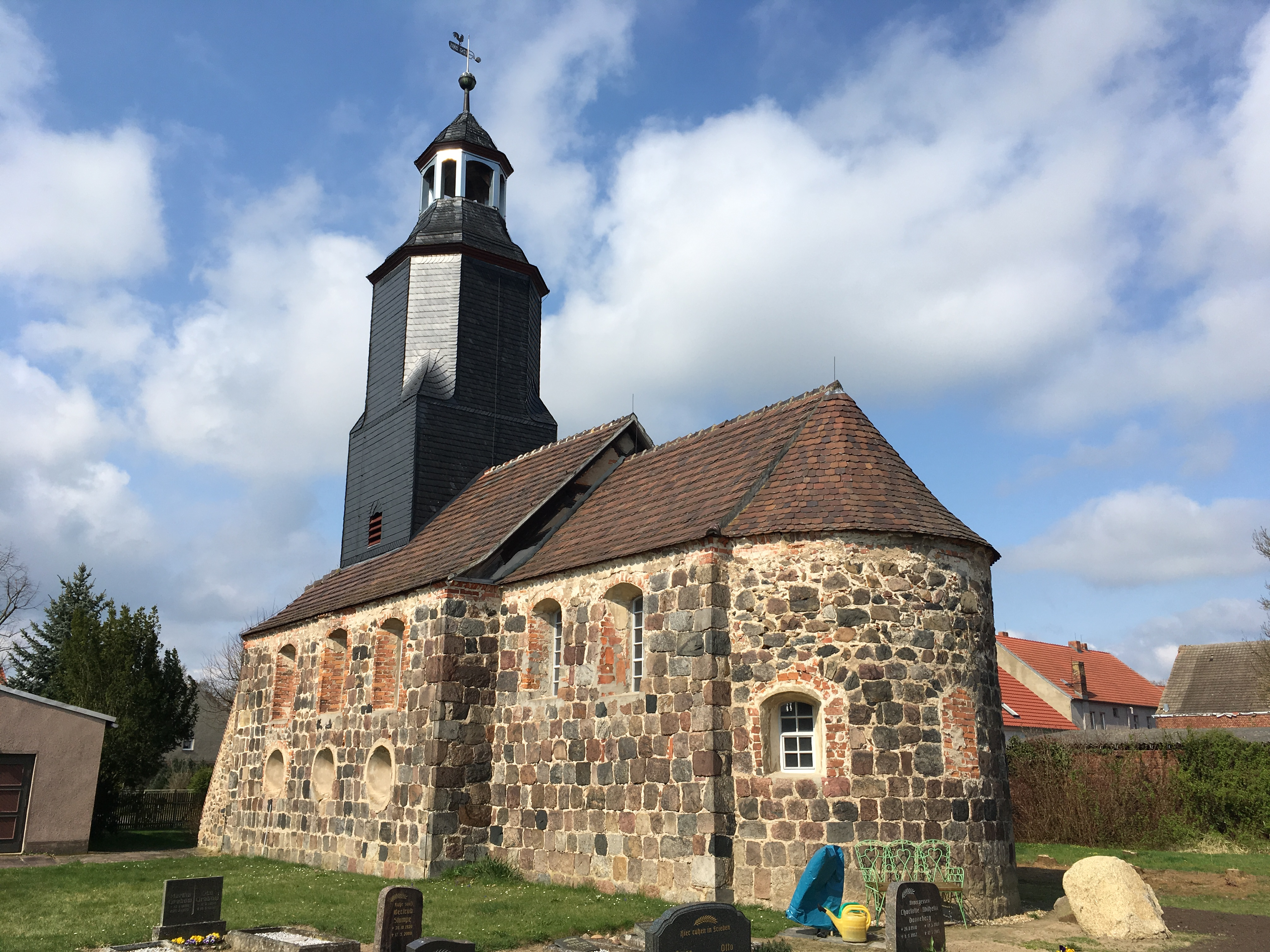 Die Dorfkirche in Kaltenborn bei Niedergörsdorf entstand in der ersten Hälfte des 13. Jahrhunderts aus Feldsteinen. Im Innern ist ein Kanzelaltar aus dem 19. Jahrhundert sowie eine Orgel von Johann Tobias Turley.